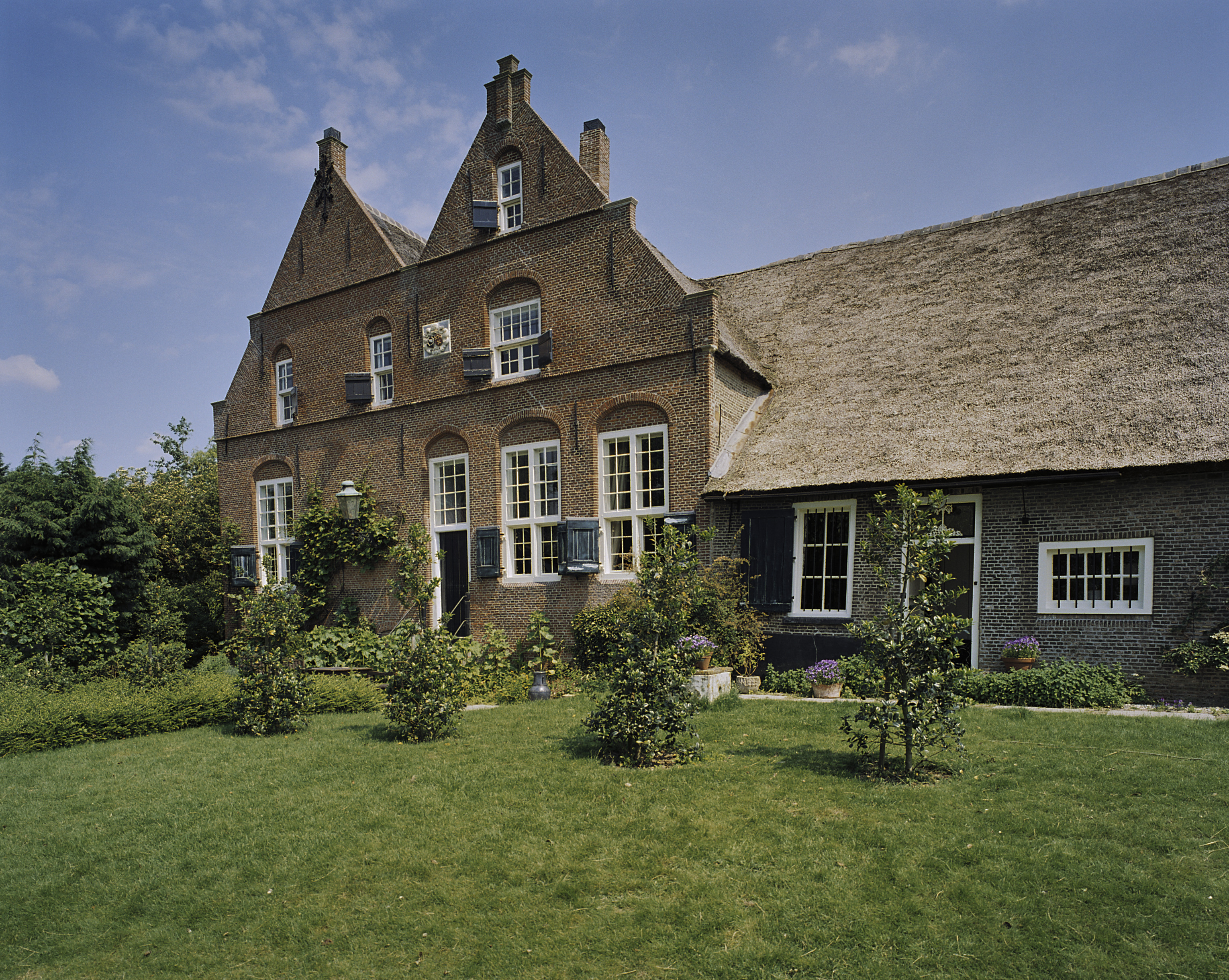 Boerderij Rheestein: Overzicht voorgevel met toppilasters (opmerking: Gefotografeerd voor Monumenten In Nederland Zuid-Holland)